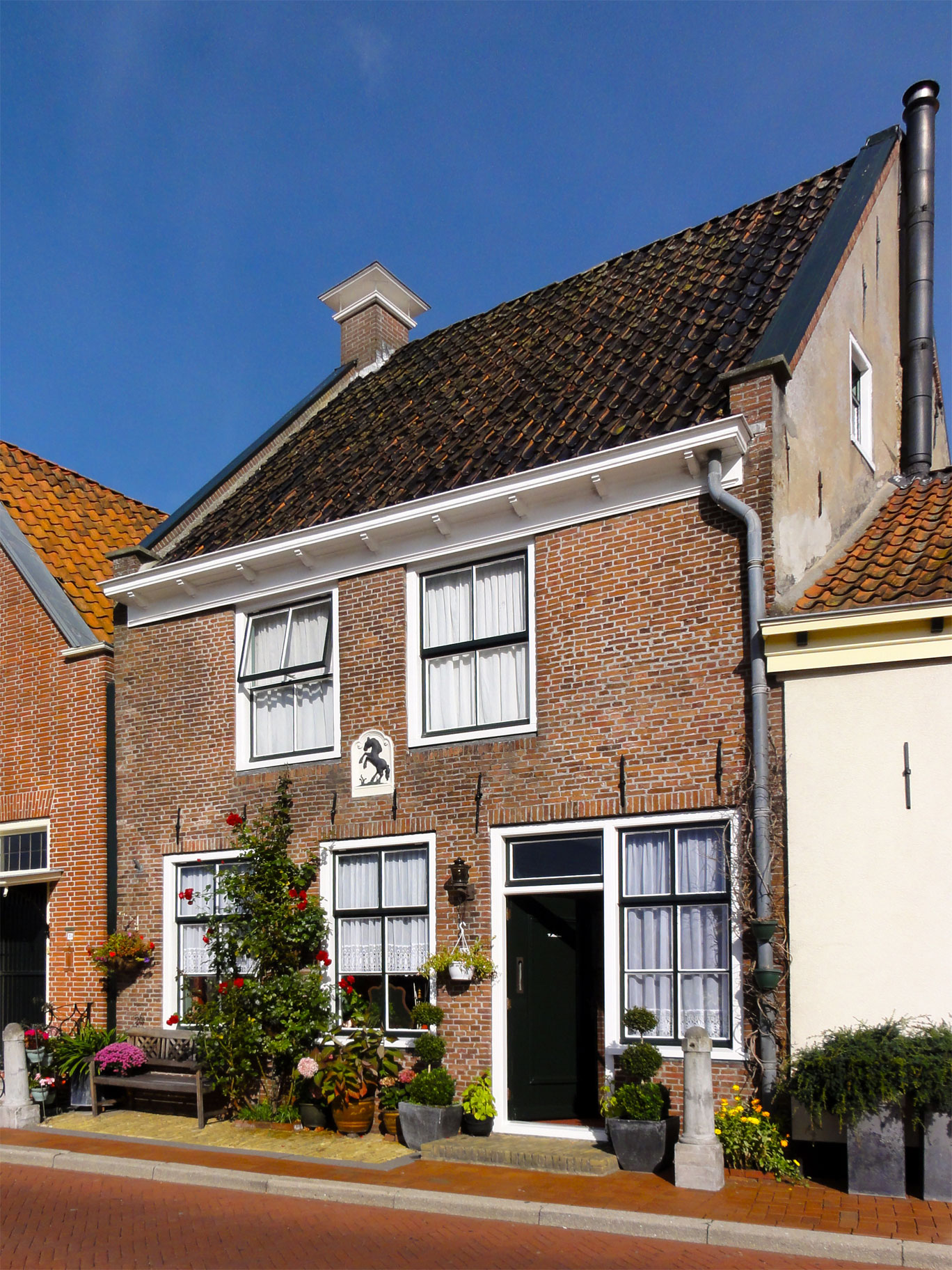 Diepswal 33, Dokkum, rijksmonument